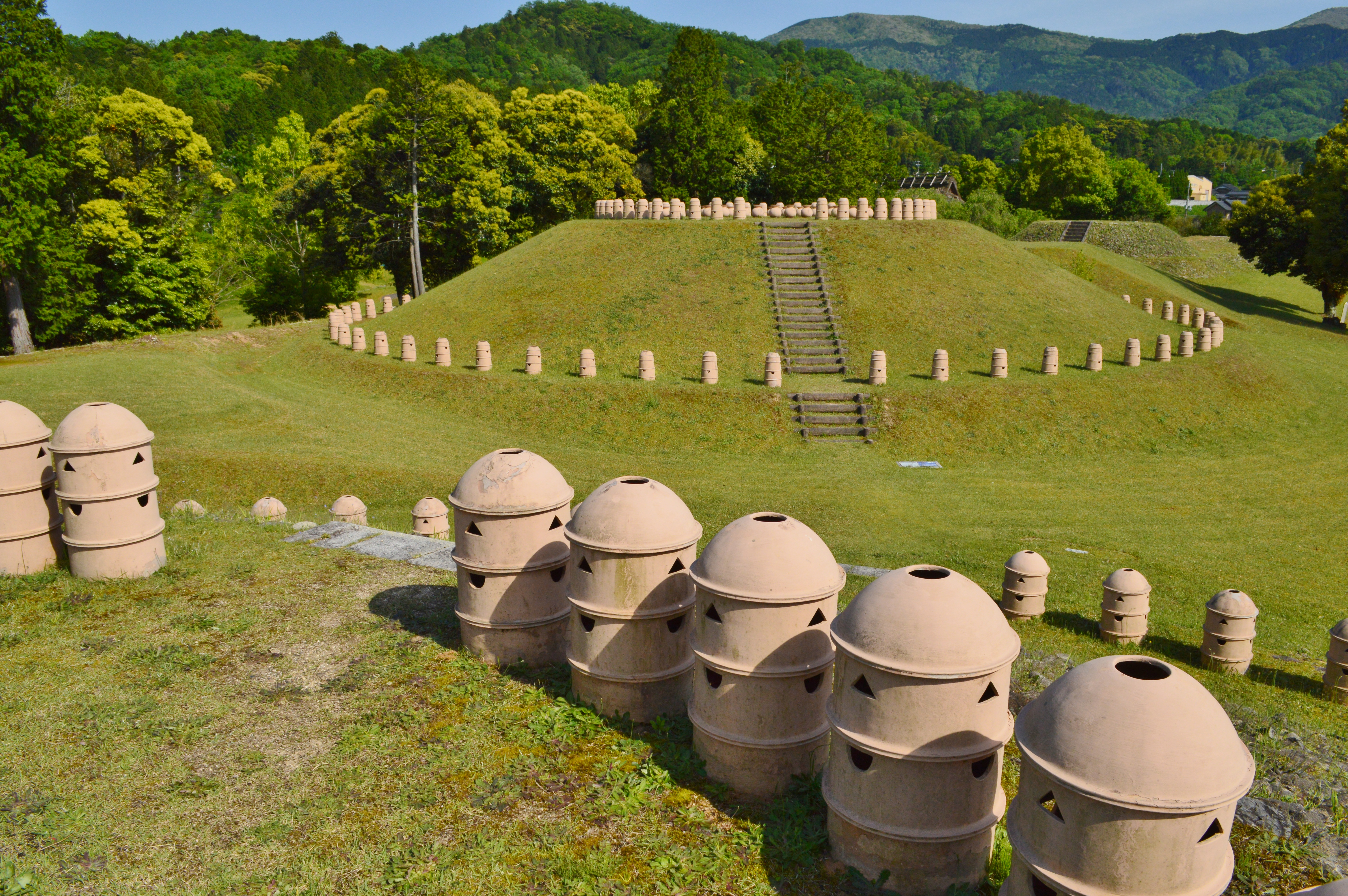 作山古墳群 (与謝野町) 概観